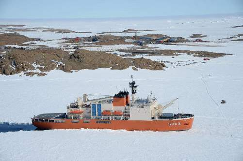 昭和基地に接岸したしらせ（２代目）